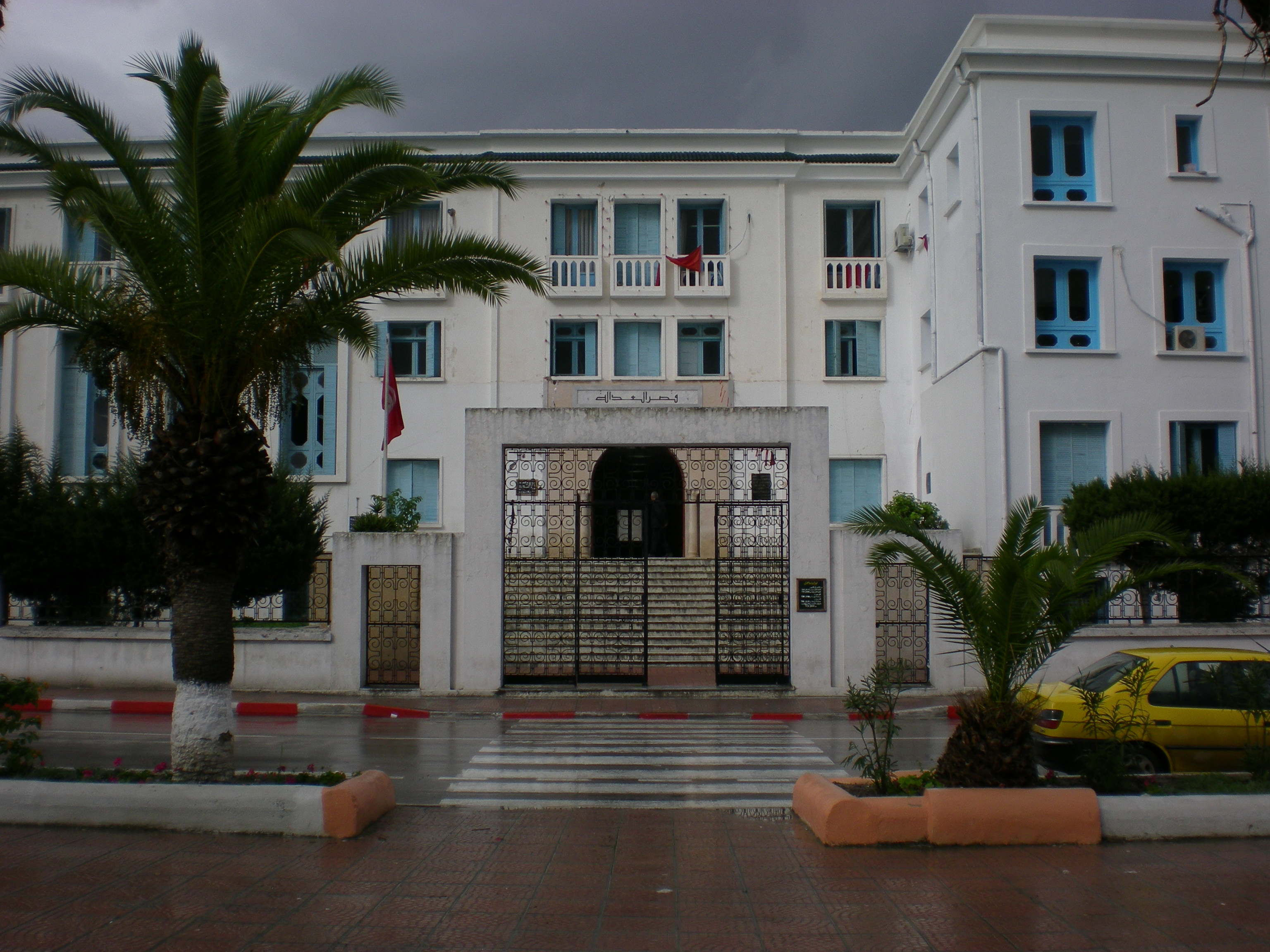 Palais de Justice de Bizerte